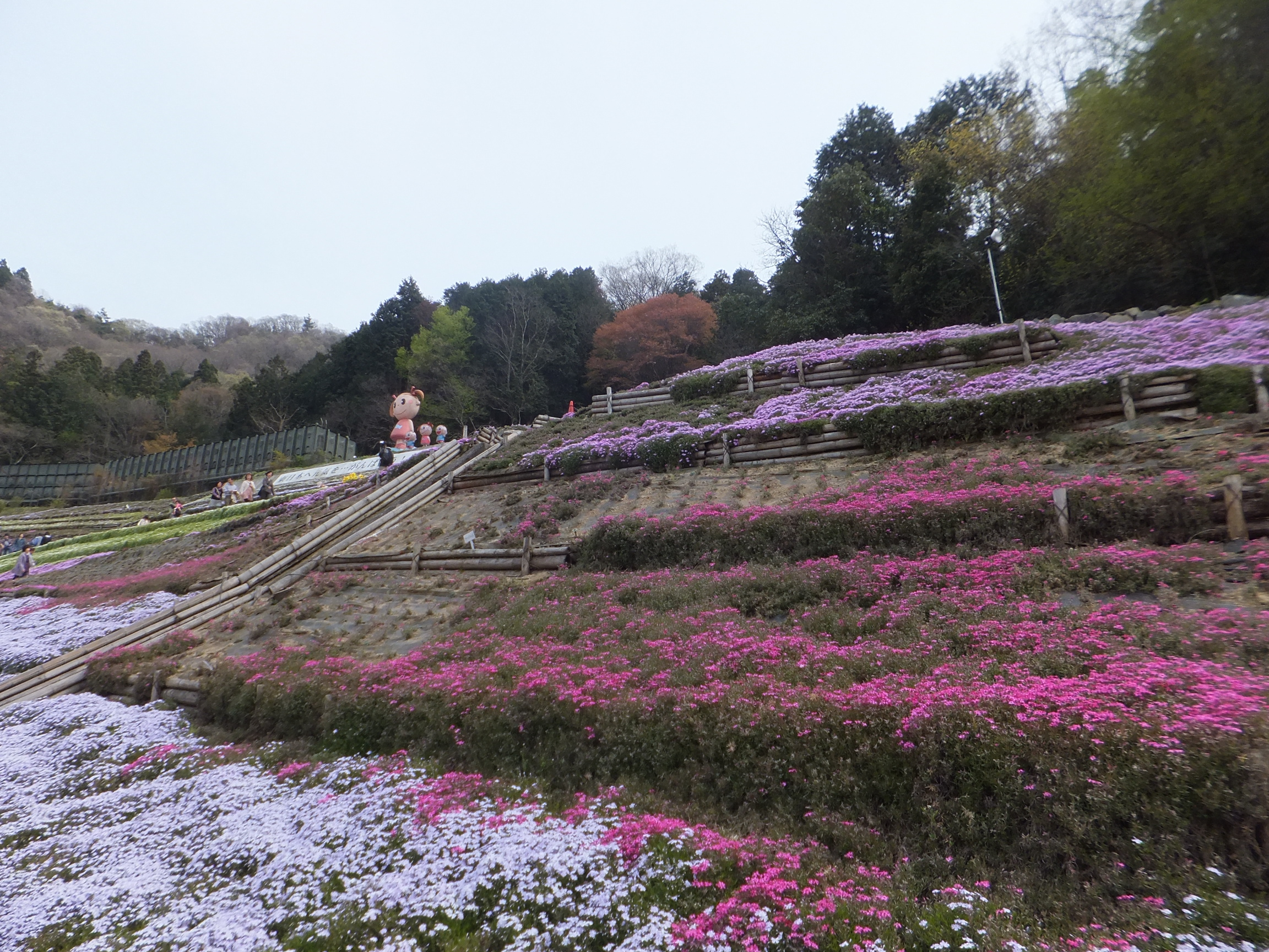 ヤマサ蒲鉾夢前工場の芝桜